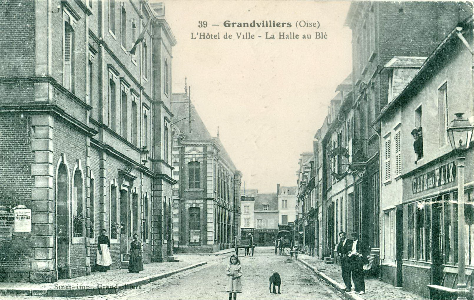 Carte postale ancienne éditée par Sinet, N°39 GRANDVILLIERS (Oise) : l'Hôtel de Ville & la Halle au blé